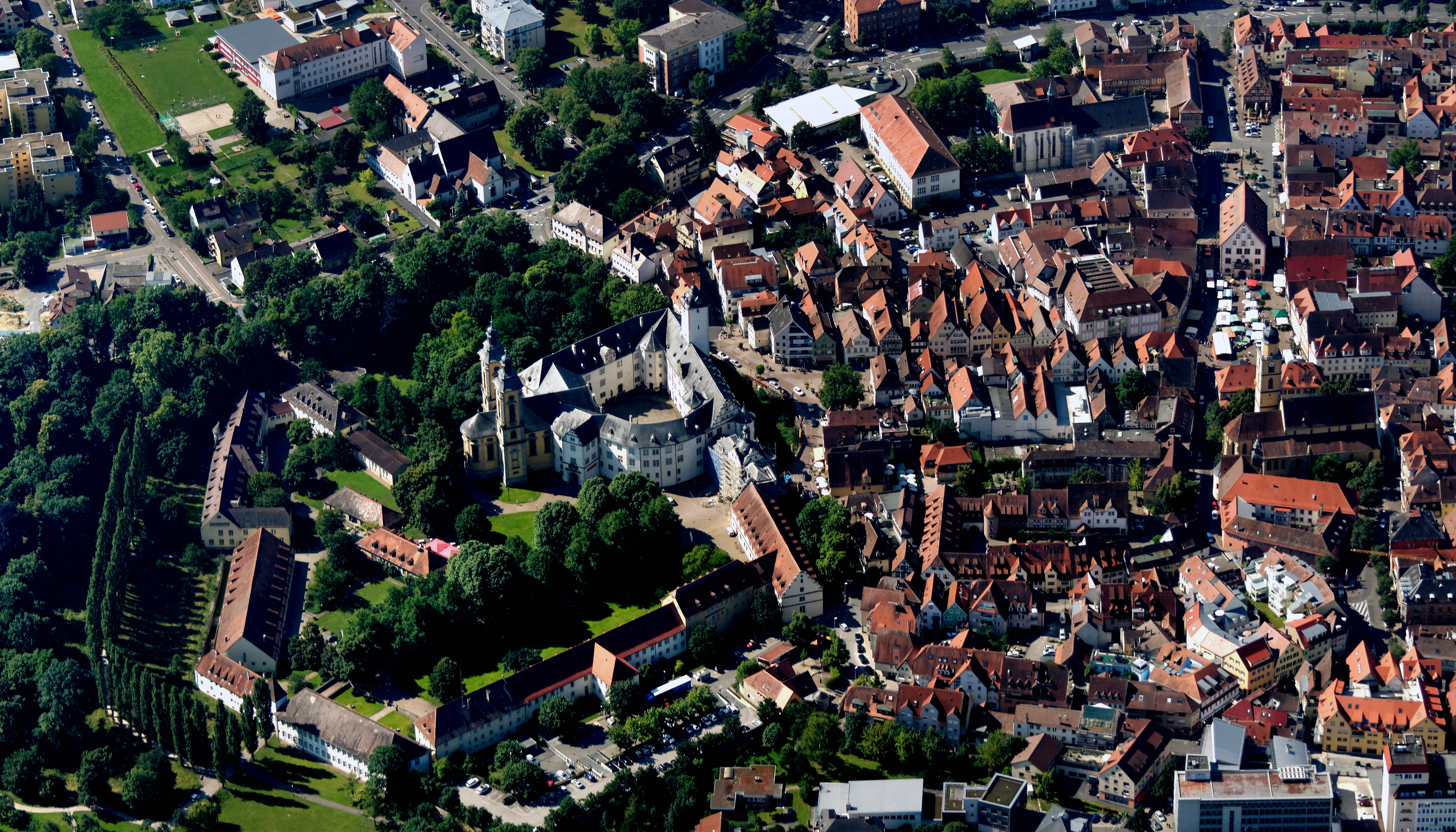 Von 1525 bis 1809 war das Bad Mergentheimer Schloss Zentrale des Deutschen Ordens. Im gleichnamigen Museum wird die Geschichte des Ordens bis in das 21. Jahrhundert dargestellt.